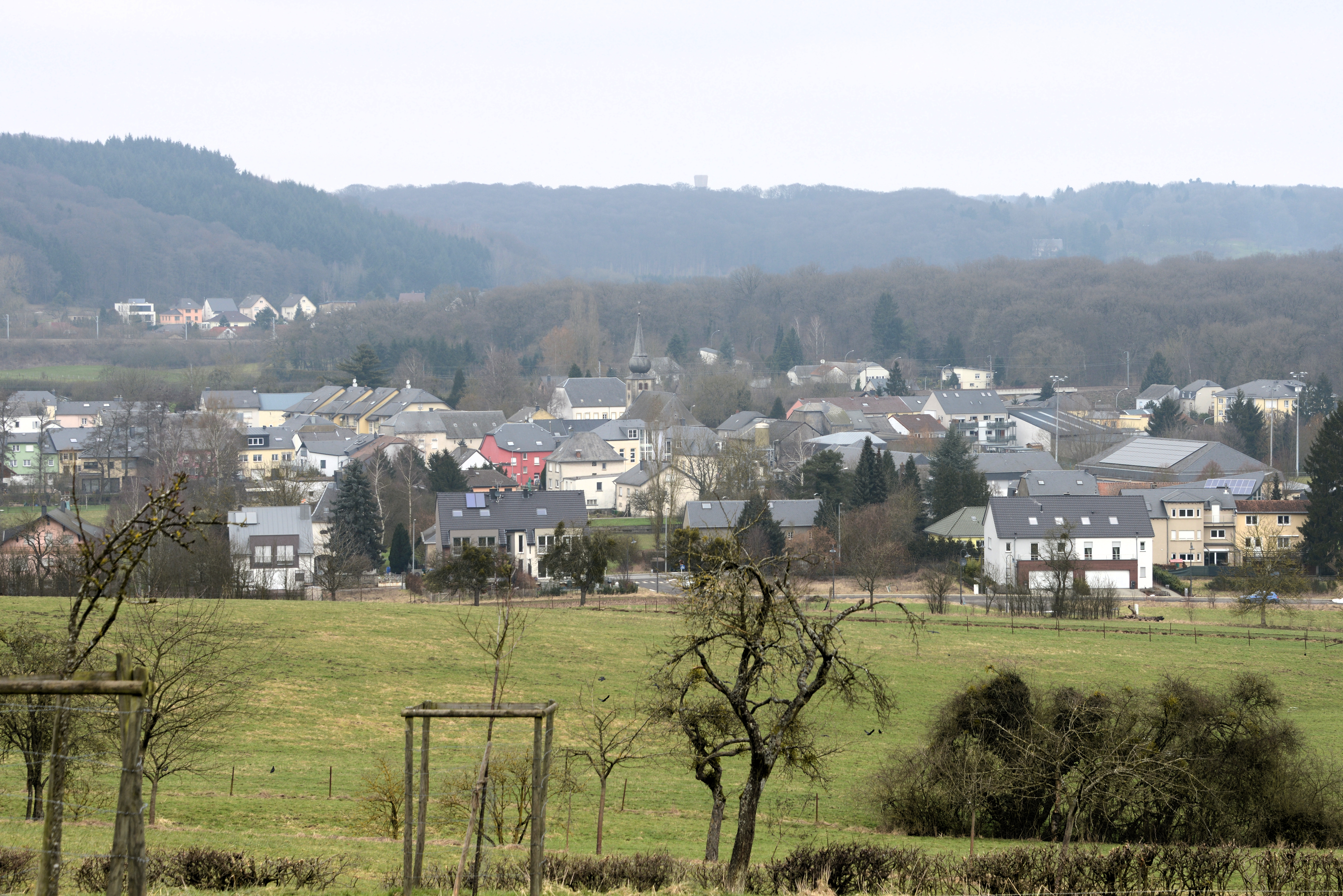 Vue op Mutfert.